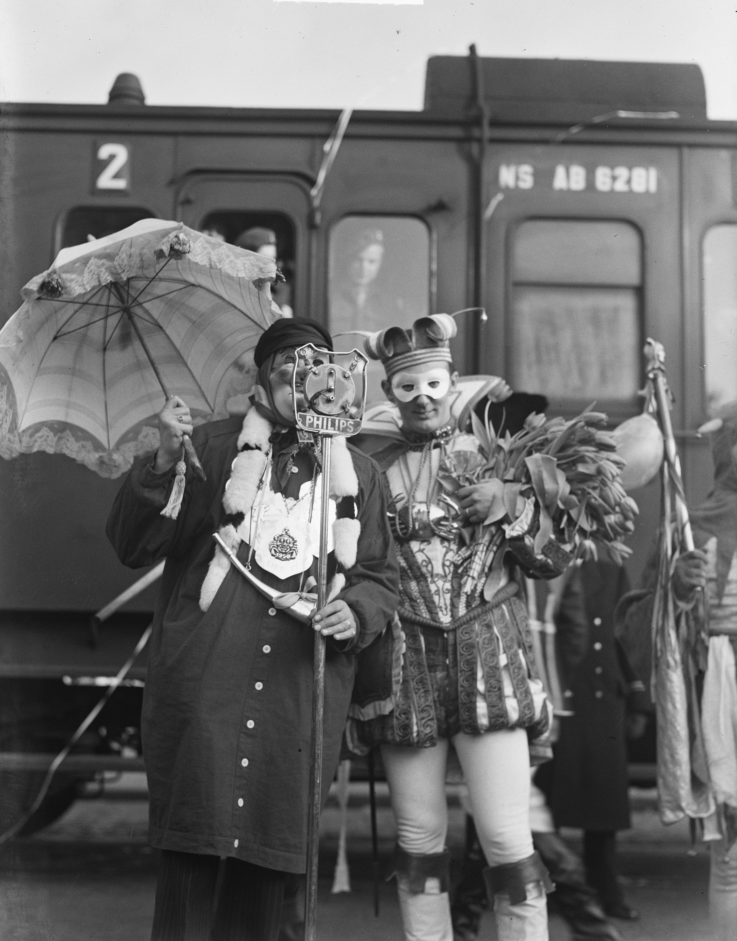 Carnaval in Bergen op Zoom, bij het station. Prins Nilles (Kees Becht, geb. 1917). Datum: 18 februari 1950